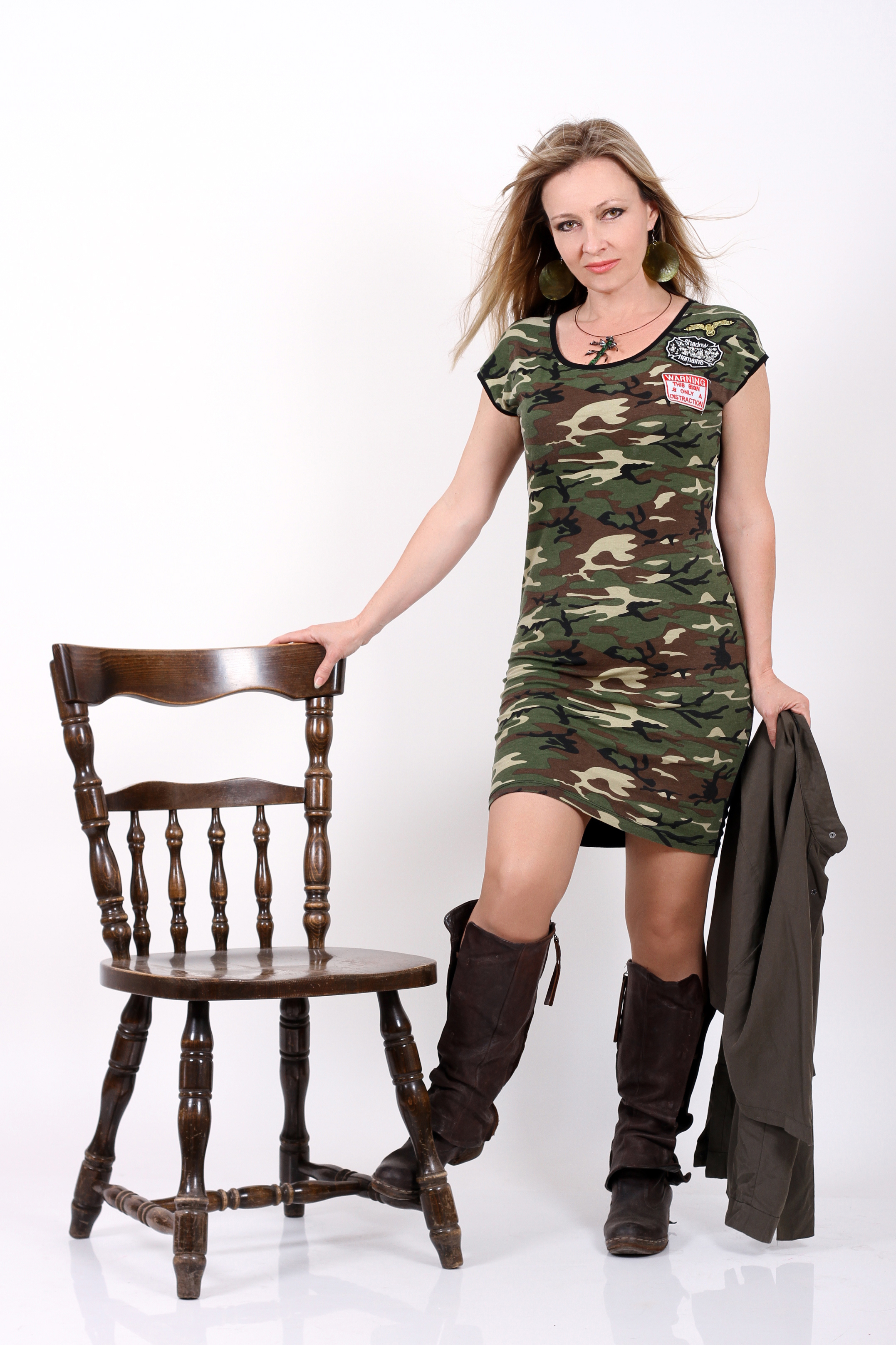 Svetlana Sretenović